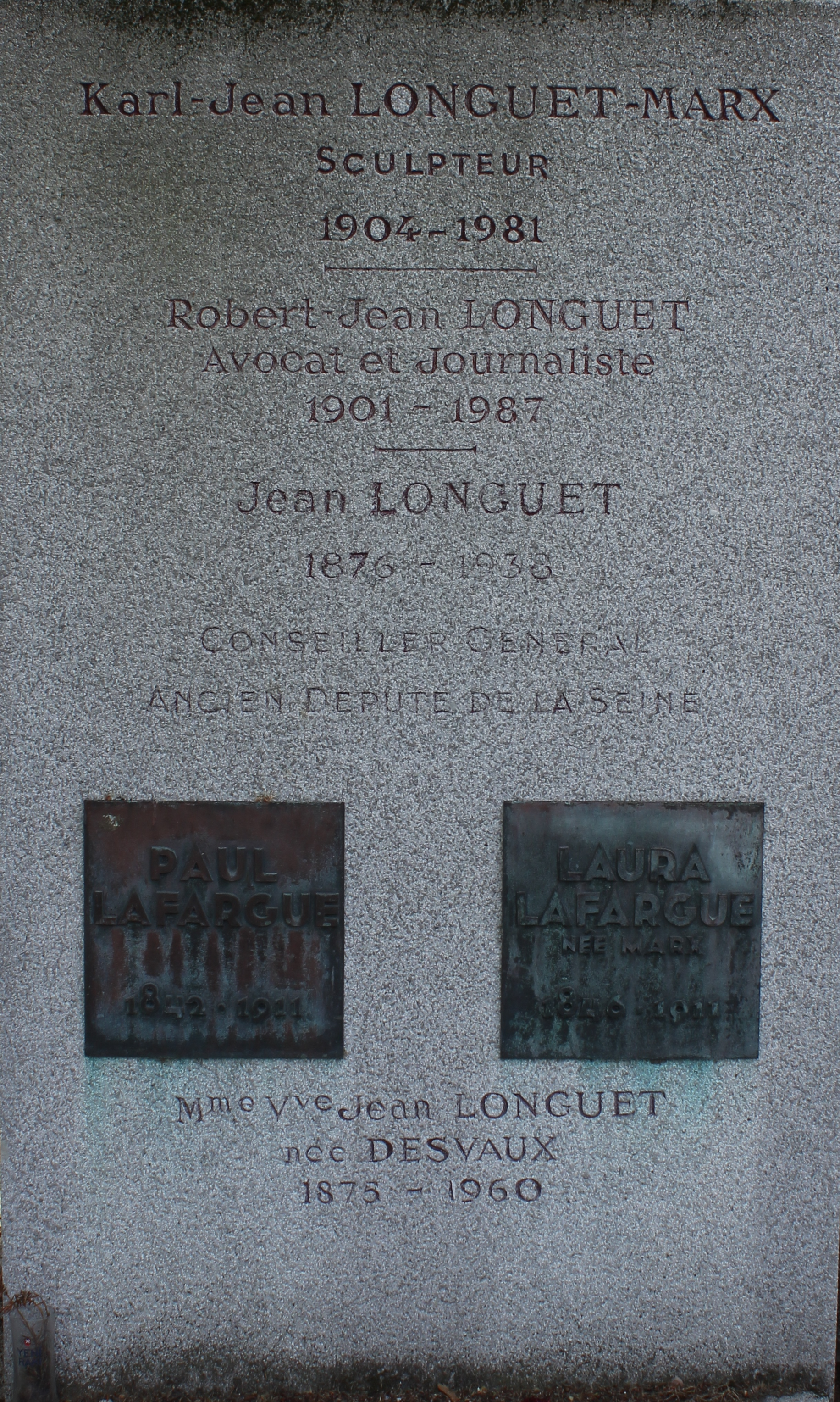 inscriptions